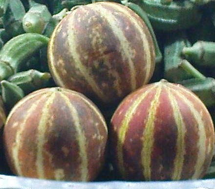 Cucumis melo var. dudaim